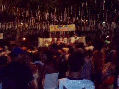 Carnaval na Praça de Quintino, 2005.